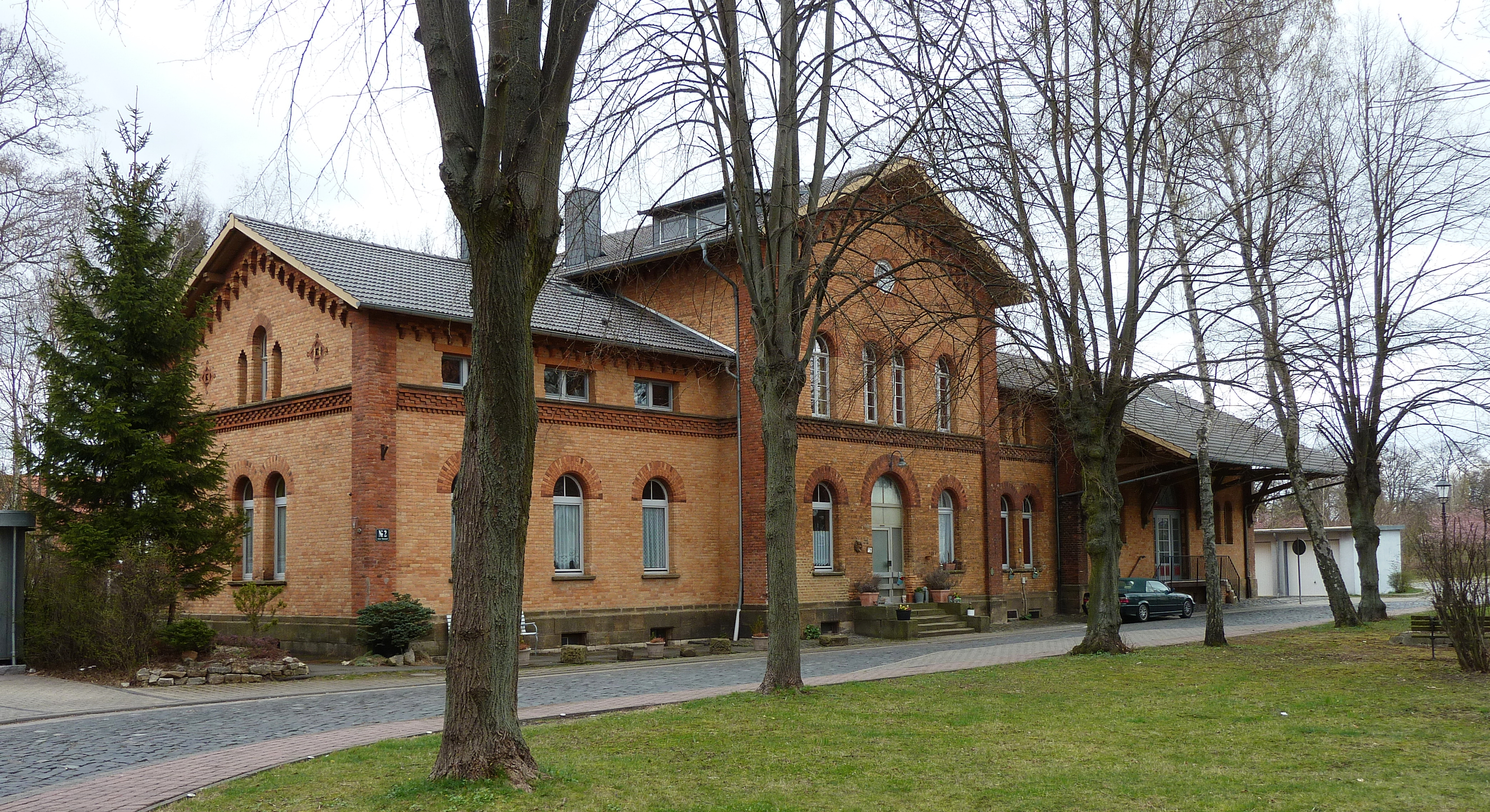 Ehemaliges Bahnhofsgebäude der Dransfelder Rampe in Dransfeld, Landkreis Göttingen, Südniedersachsen